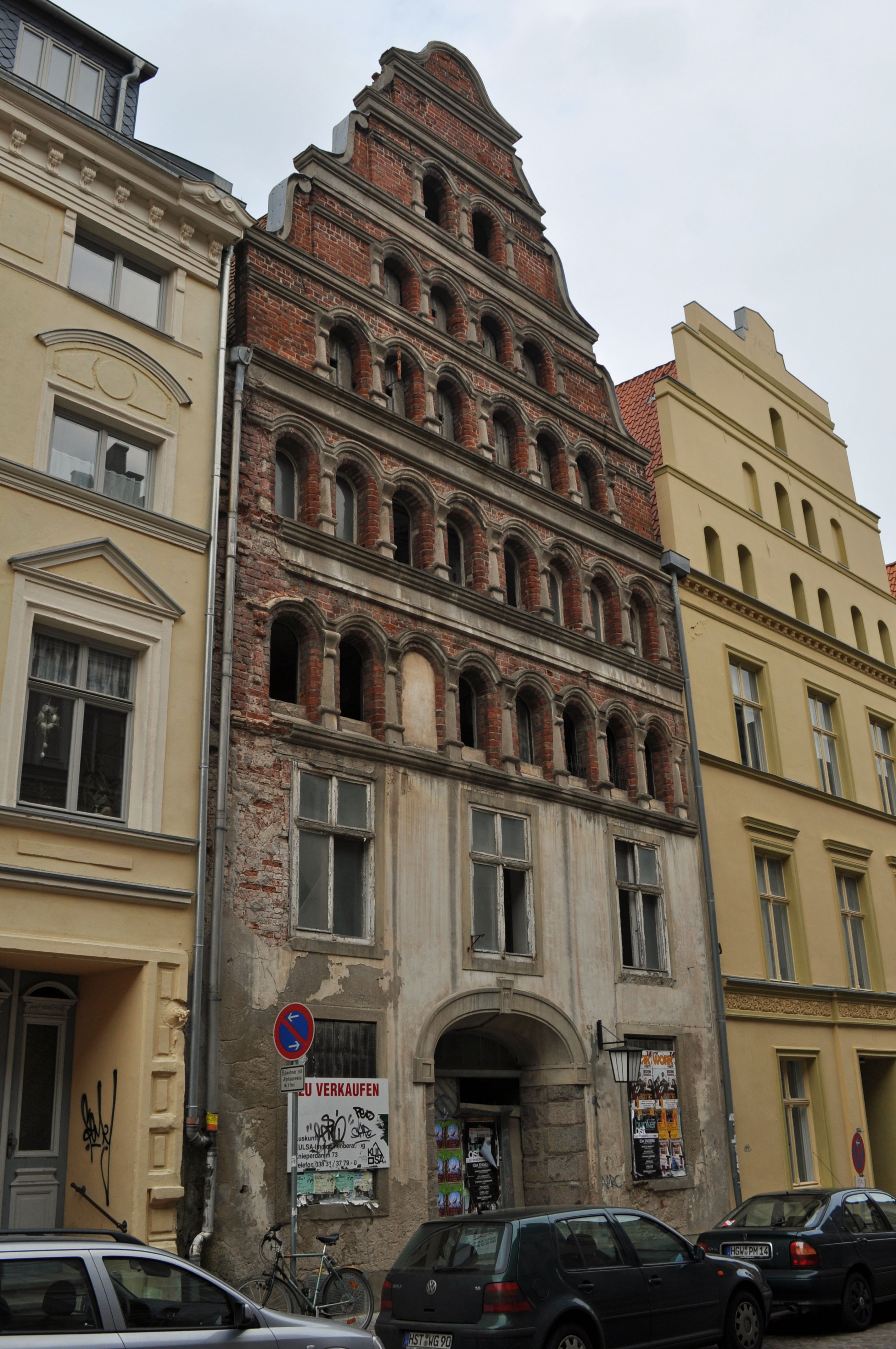 Gebäude bzw. Gebäudedetail in Stralsund. Straße und Hausnummer siehe Dateiname.